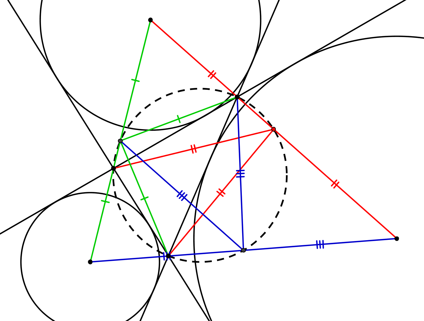 трезубец окр эйлера8